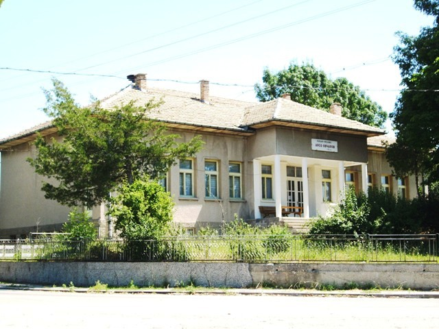 Сградата на Народното читалище "Арсо Овчаров" в село Долец, Поповско - юли 2008 год. Фото: Вл. Стойков